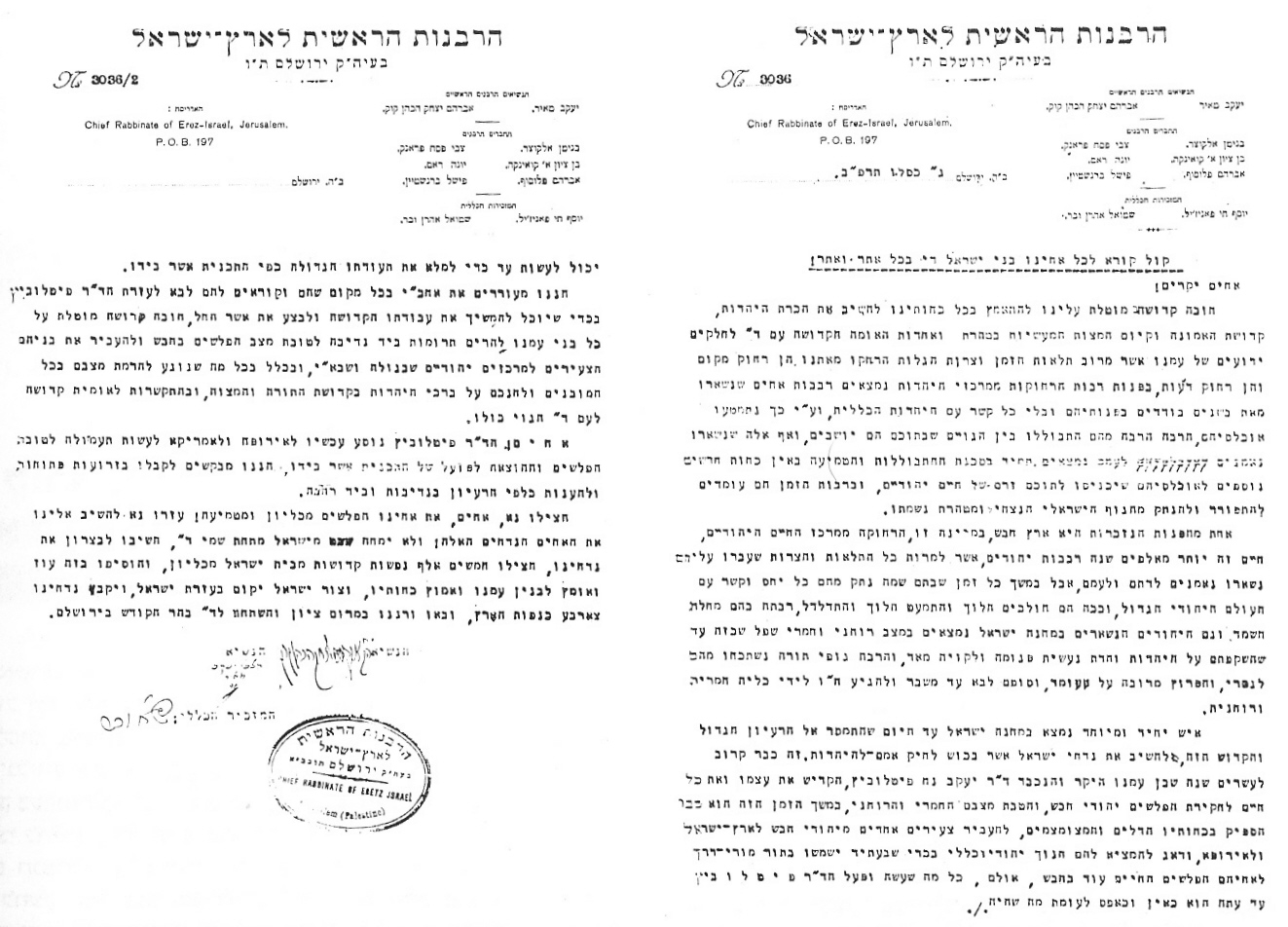 "קול קורא" הרבנים הראשיים לארץ ישראל אל יהודי חבש - ה'תרפ"ב (1921)